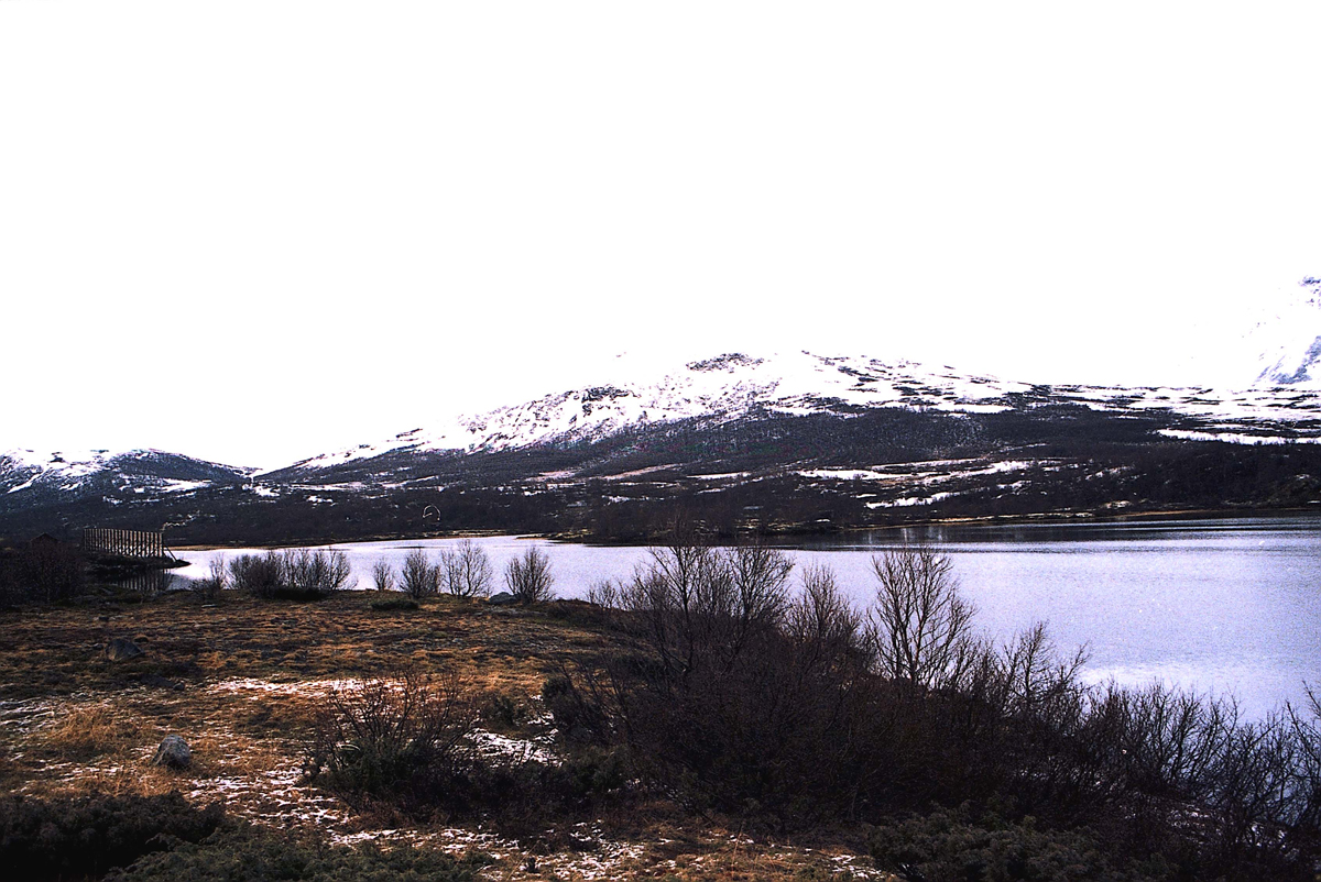 Dovrefjell lake in late fall - photography by Leif Knutsen, 1986